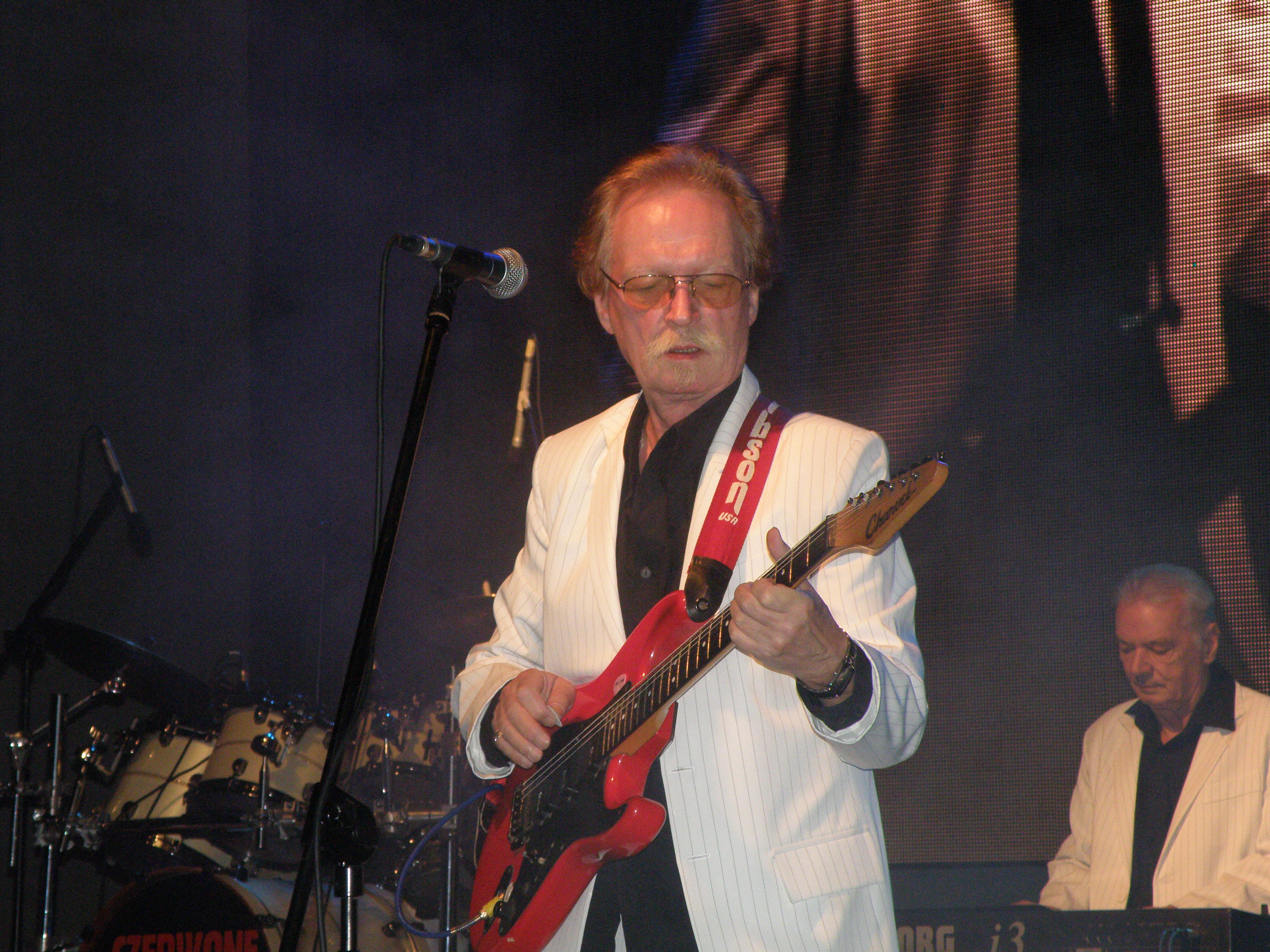 Czerwone Gitary. Koncert z okazji Dnia Kolejarza 2009 w Sali Kongresowej.